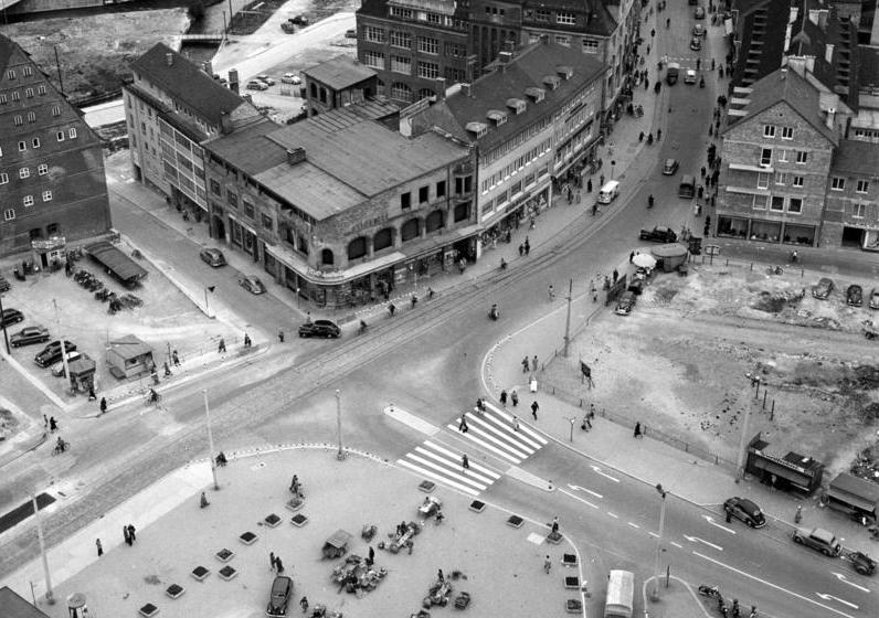 Ulm Blick vom Hauptturm des Ulmer Münsters auf den westlichen Teil des Münsterplatzes. Die Baulücken stammen von der am 17.12.1944 erfolgten Zerstörung der Ulmer Altstadt, bei der auch das Münster beschädigt worden war.